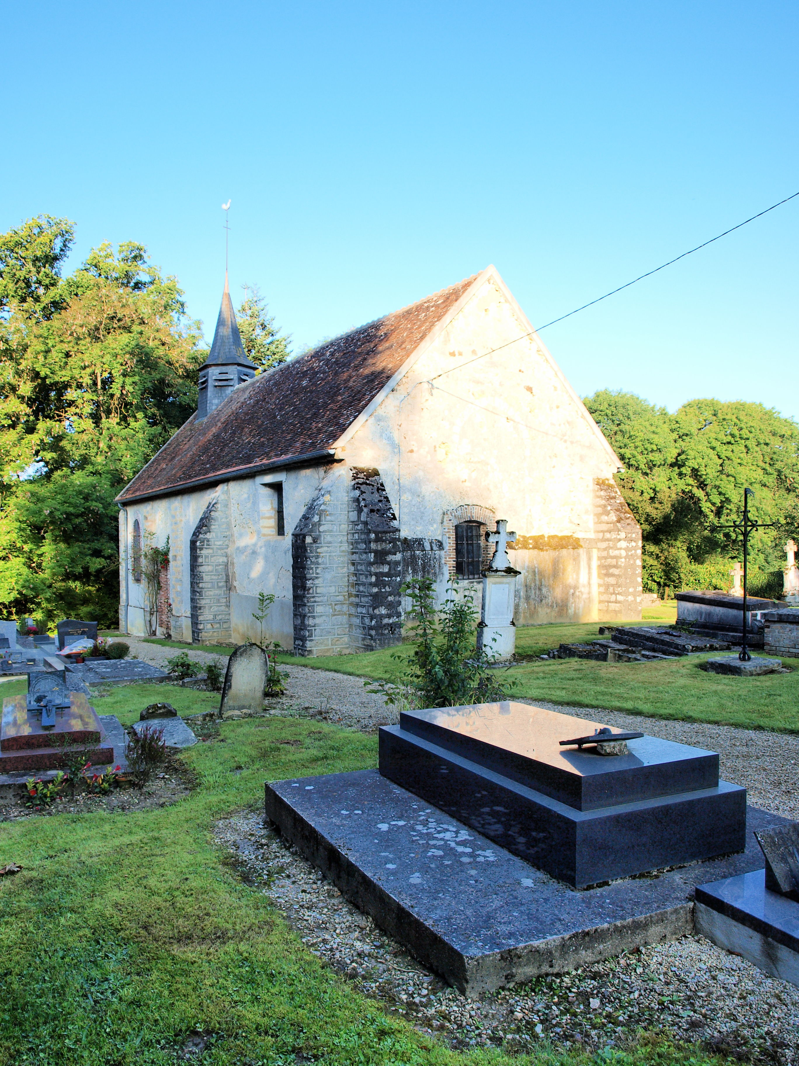 Courtoin (Yonne, France) ; l'église.